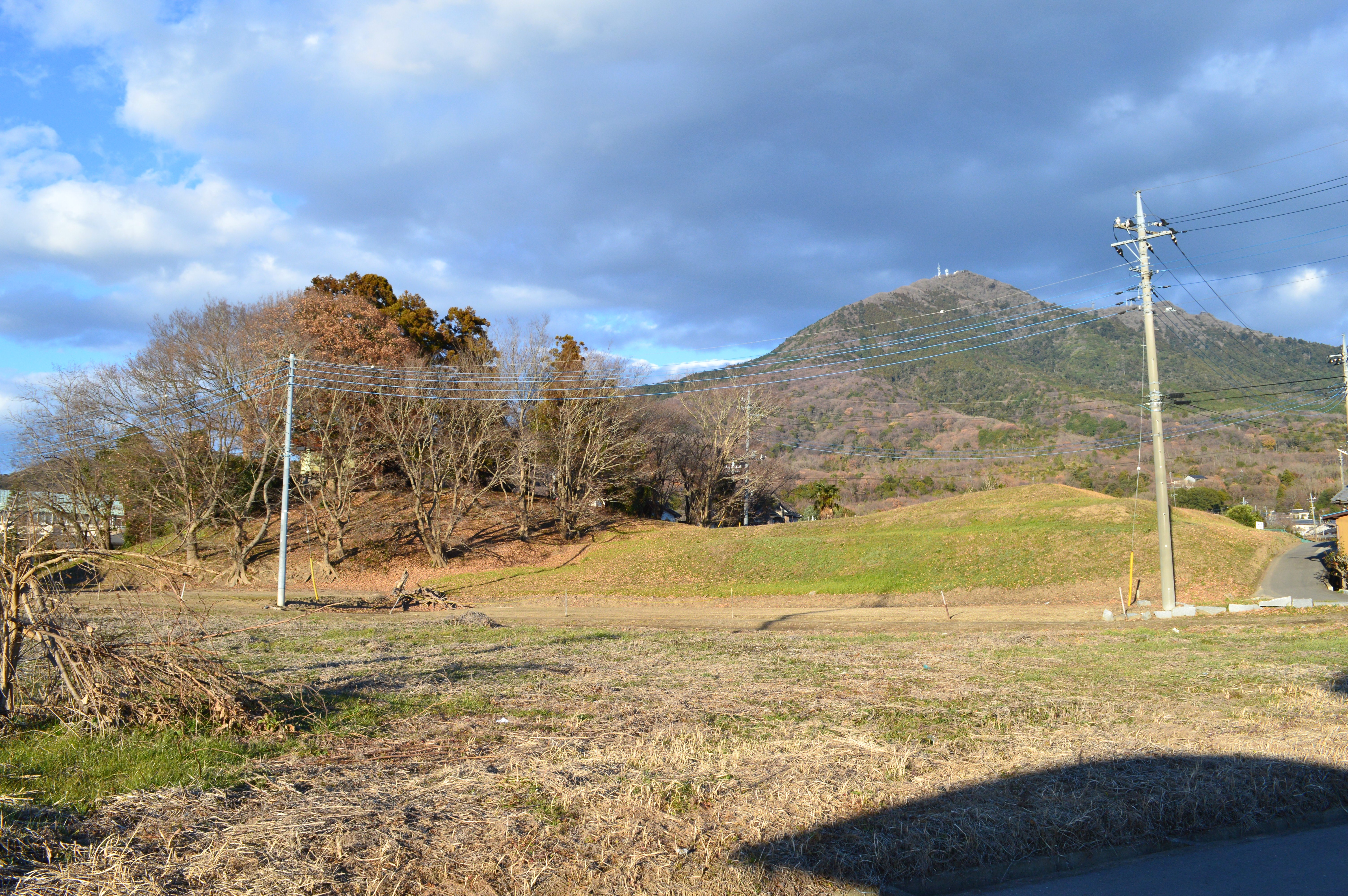 八幡塚古墳 (つくば市) 全景